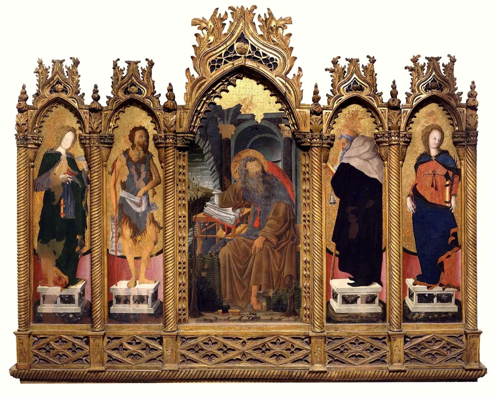 Jerónimo Lucia Bautista Antonio abad Justina